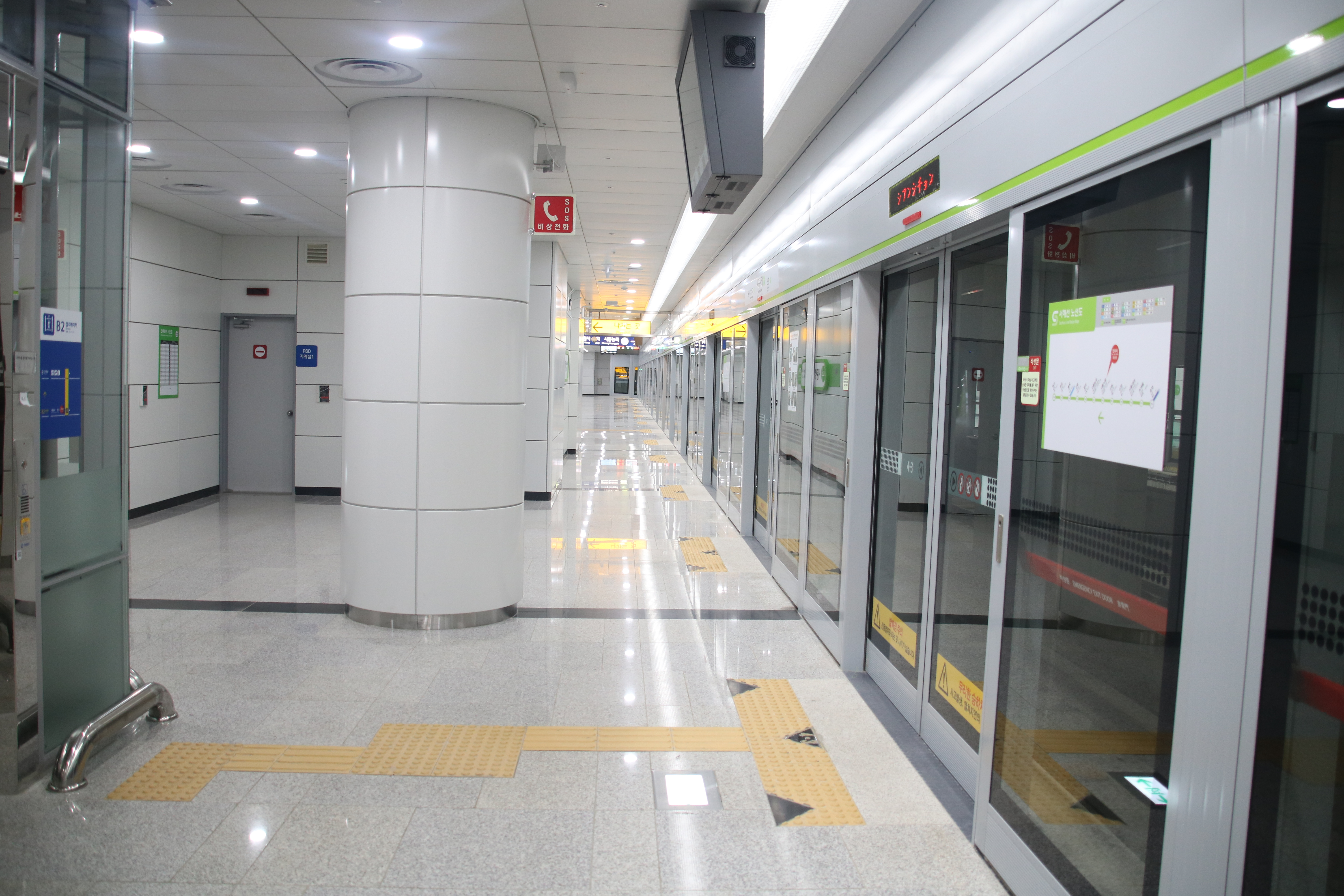 시흥시청역 승강장